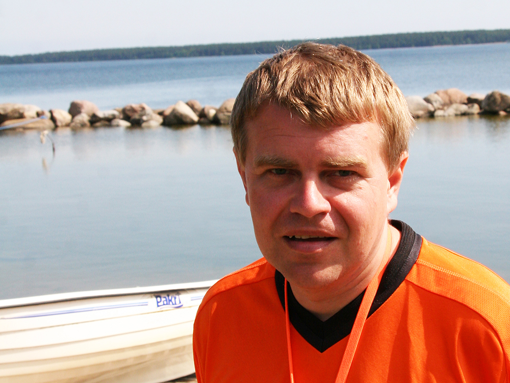 Andrus Kivirähk, en juillet 2009 à Käsmu (Estonie).